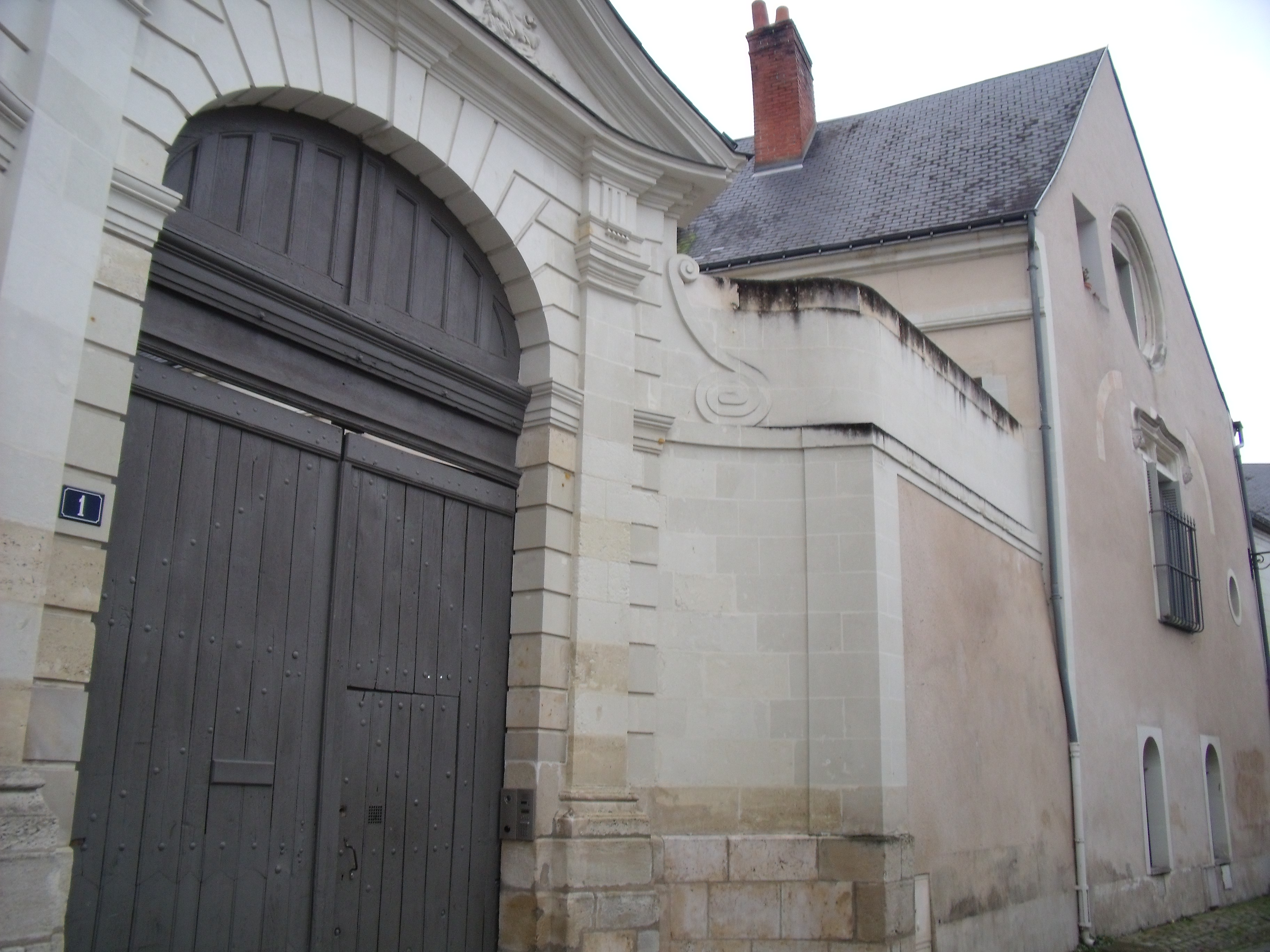 grand portail XVIIIe et église saint Nicolas XIIe siècle à droite